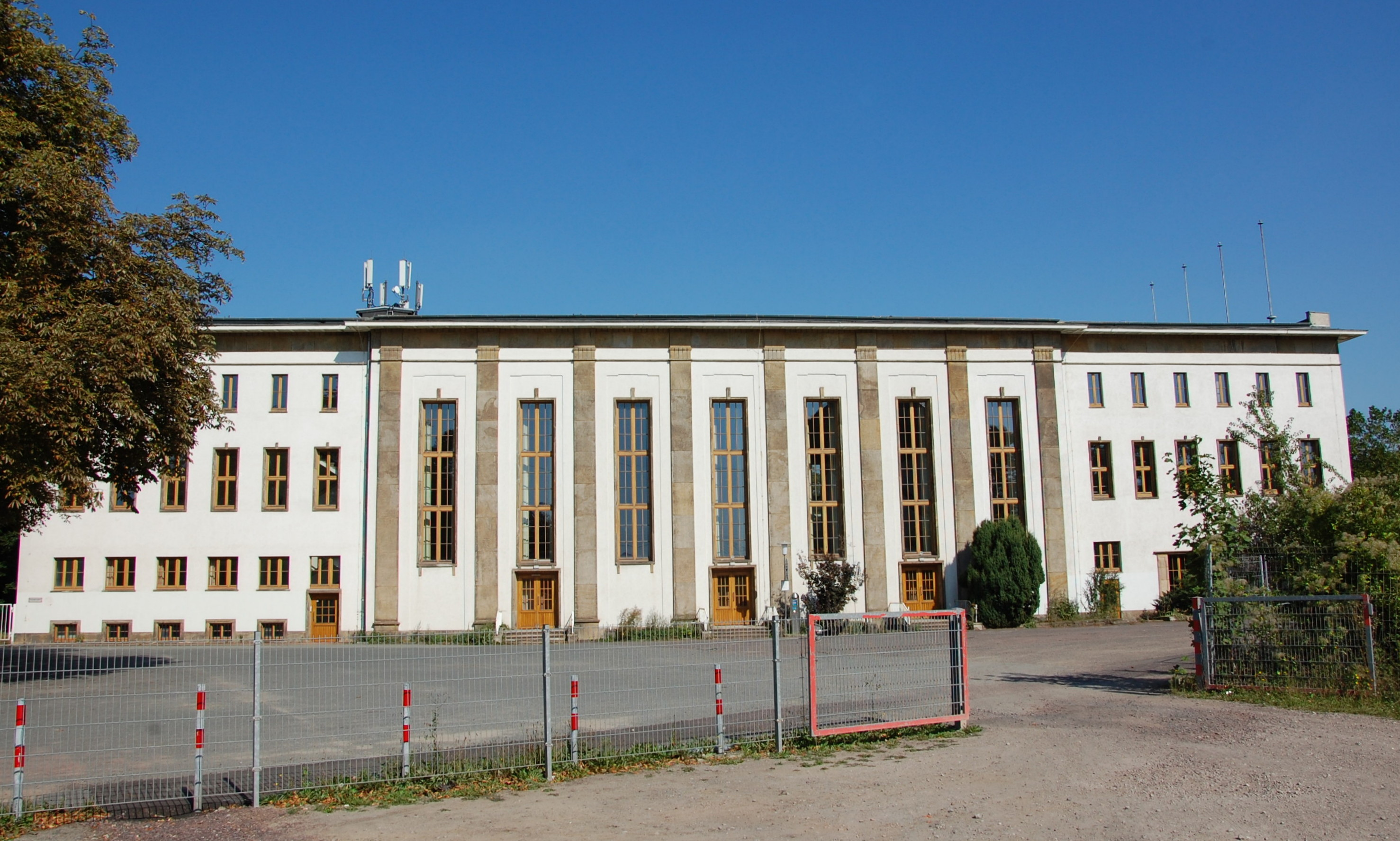 AMO Westseite